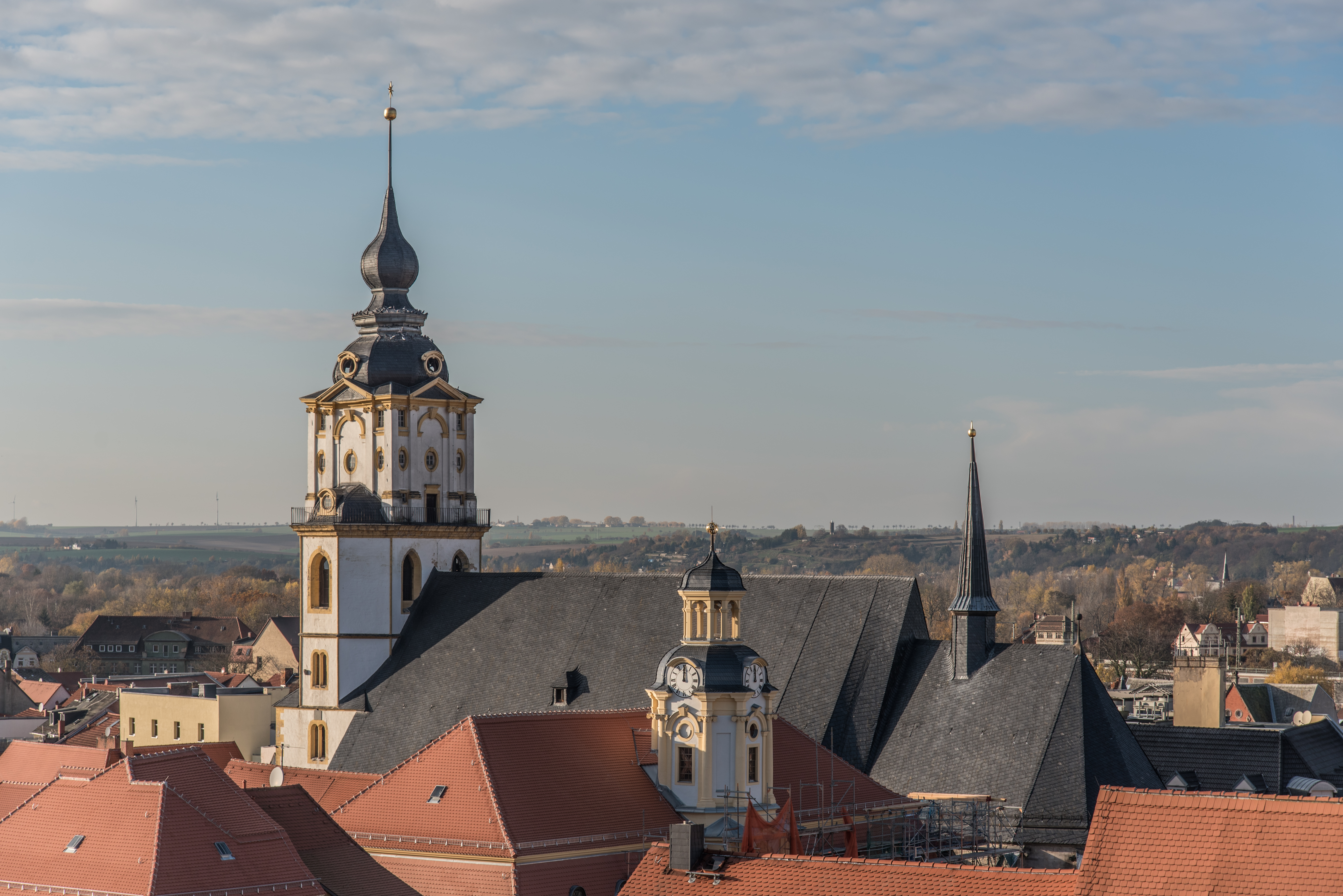 Weißenfels, Marienkirche